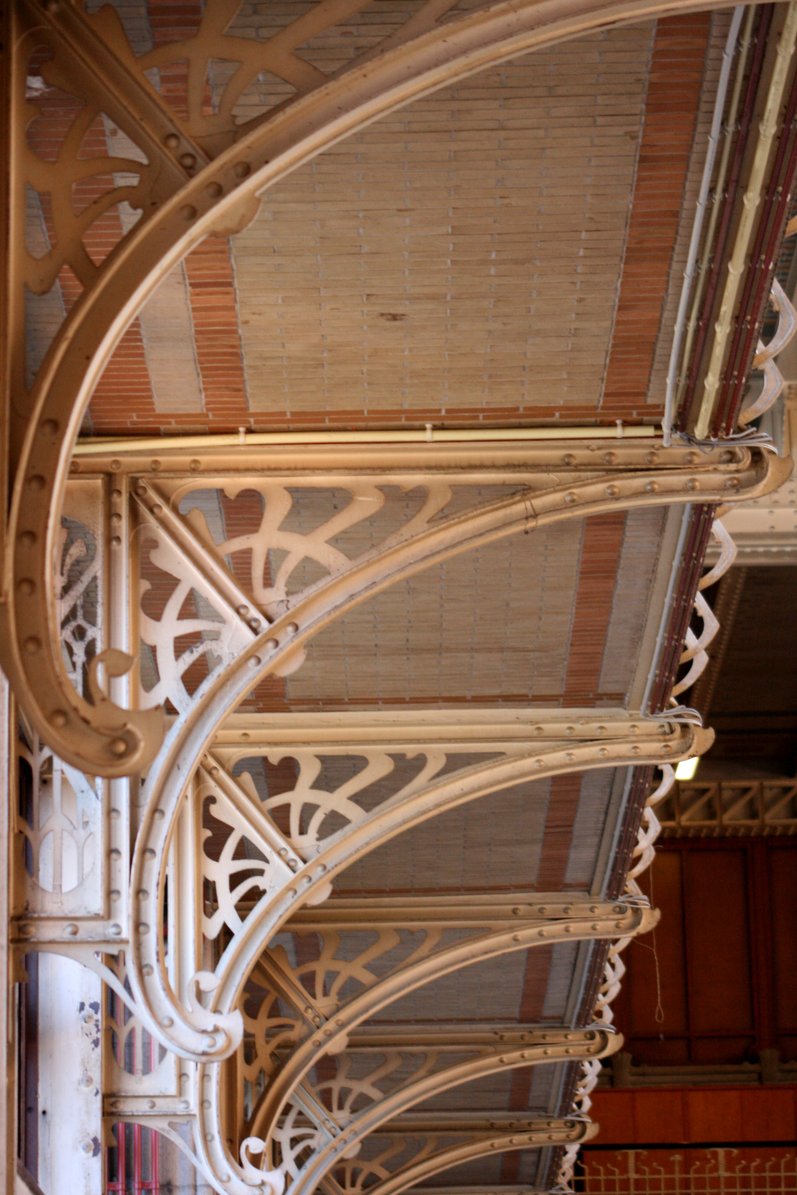 Rue Josaphat 229, Schaerbeek (Bruxelles). Groupe scolaire Josaphat. Architecte Henri Jacobs. Ferronnerie Art Nouveau de la cour de récréation